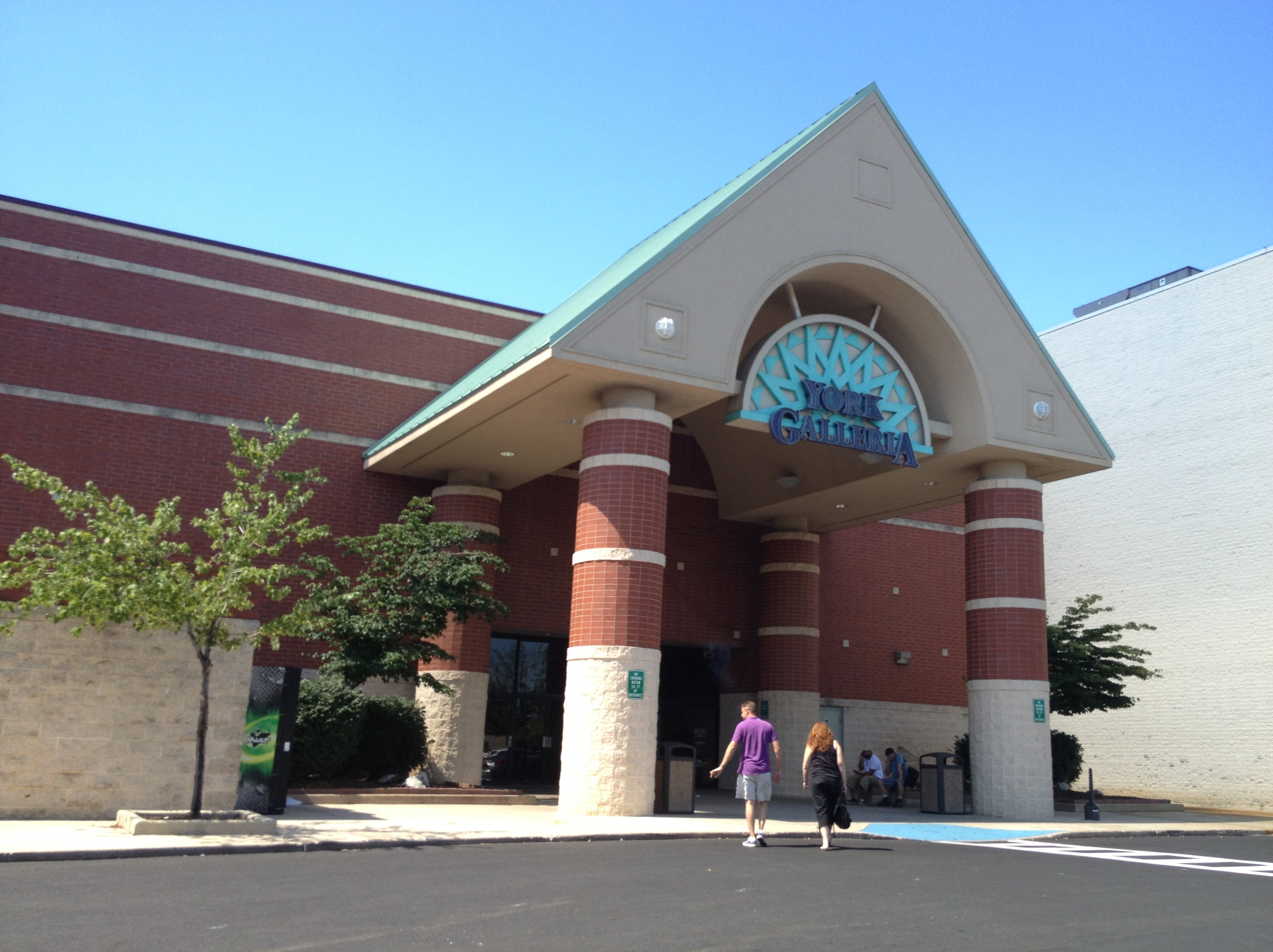 York Galleria